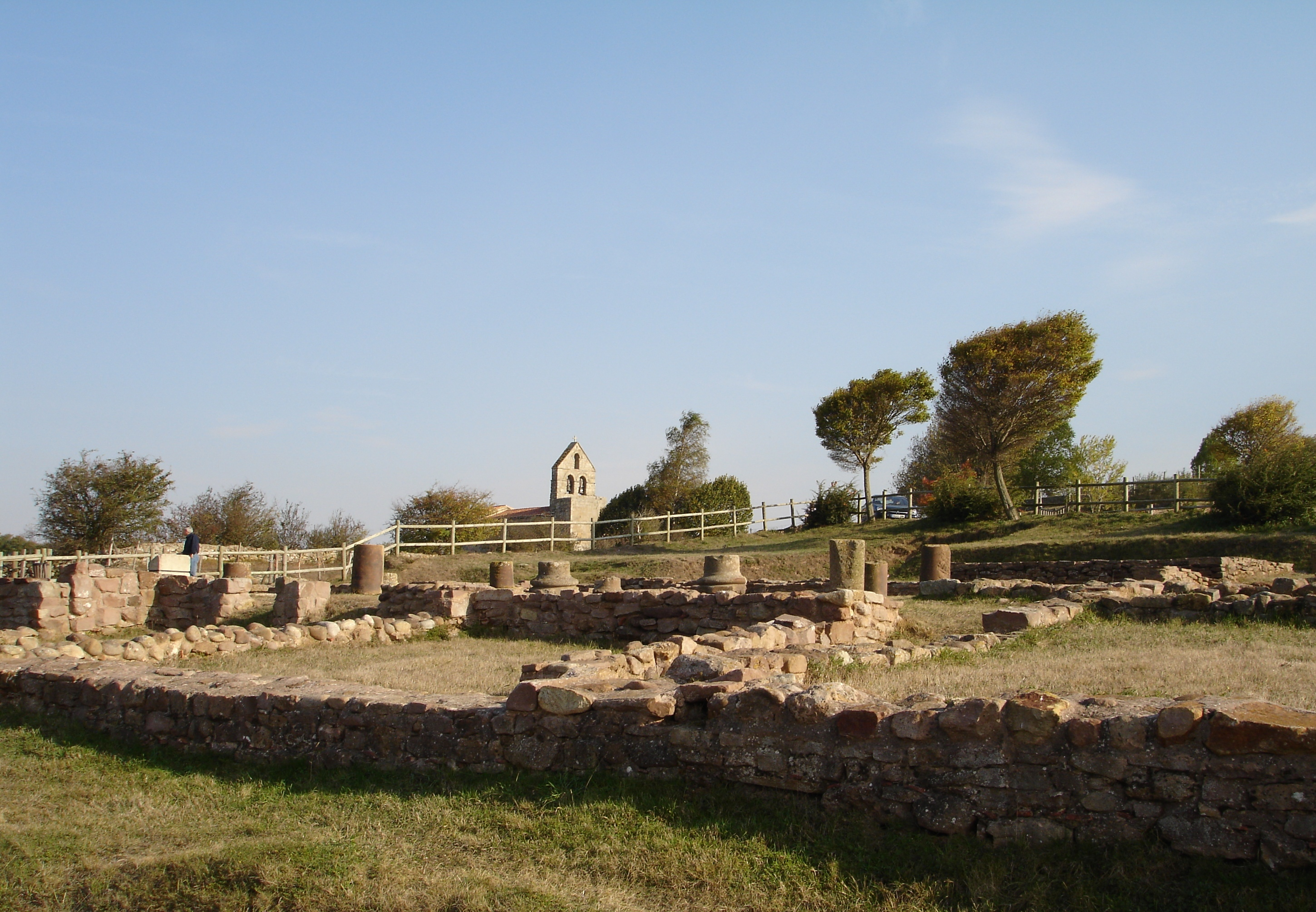 Vista norte de la «Casa de los Morillos» (Julióbriga). Al fondo, se observa la iglesia de Santa María de Retortillo.